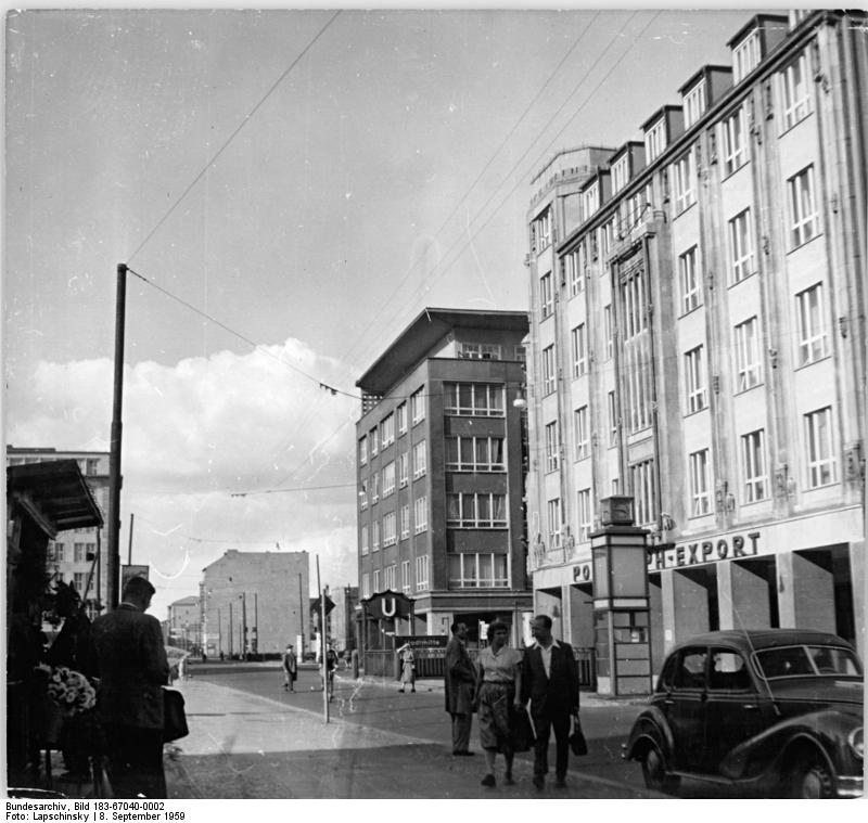 Berlin, Friedrichstraße Zentralbild Lapschinsky 8.9.1959 Berlin UBz: Die Friedrichstrasse am U-Bahnhof Stadtmitte.